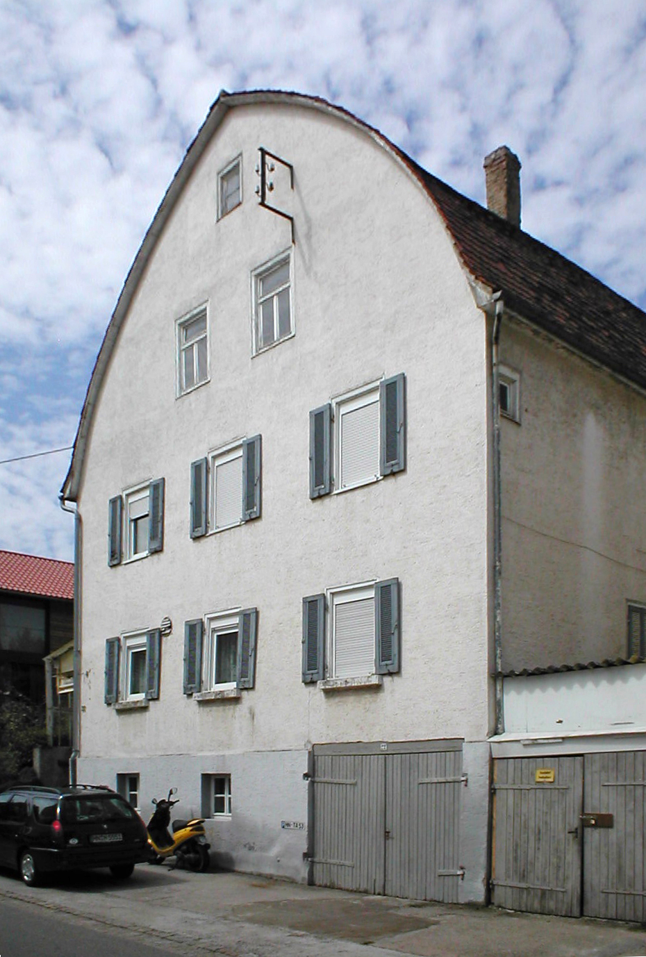 Regional untypische historische Giebelform (Zollingerdach) in der Ortsmitte von Heilbronn-Frankenbach